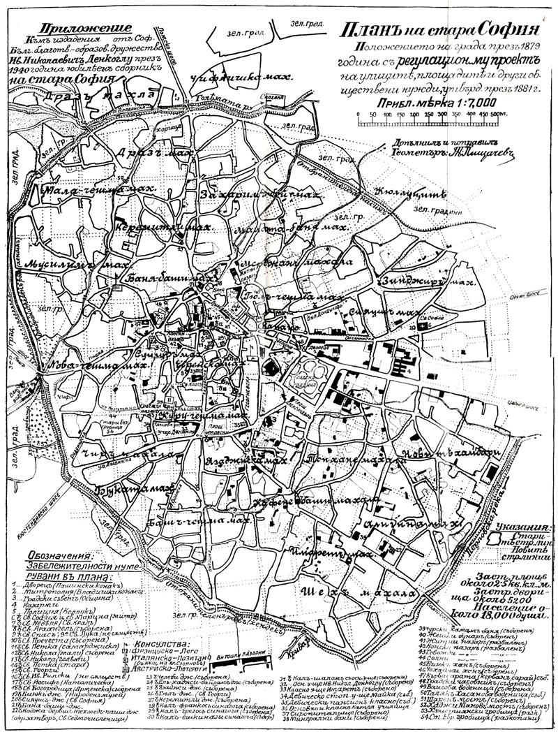 Sofia ottomanska (1879) z nalozonym na nia obecnym planem ulic wedle planu zagospodarowania przestrzennego z roku 1881